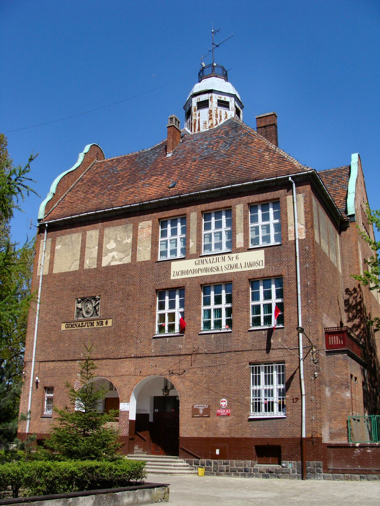 Gimnazjum Nr 6 im prof. Stefana Kownasa w Szczecinie